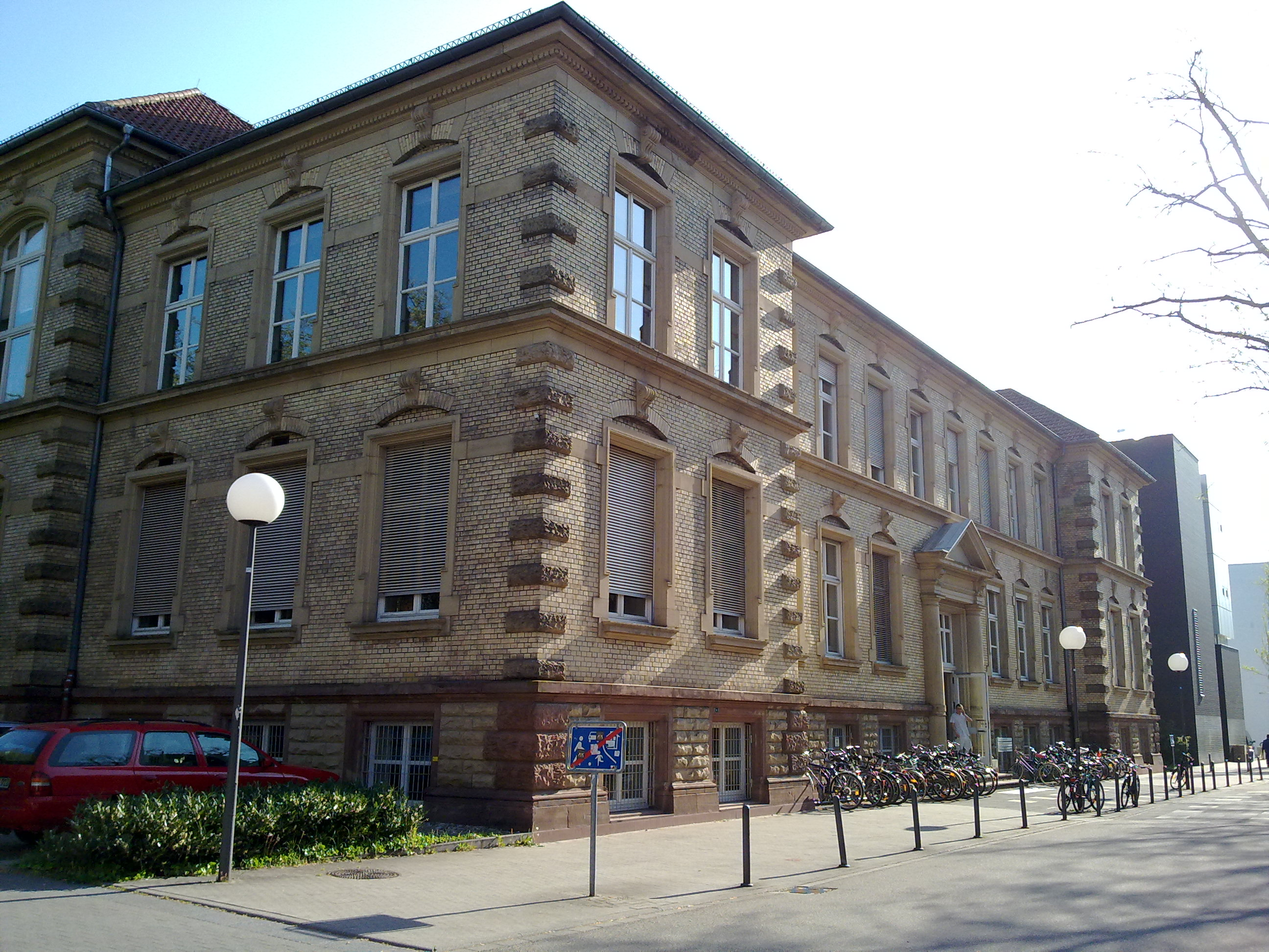 Elektrotechnisches Institut am Karlsruher Institut für Technologie